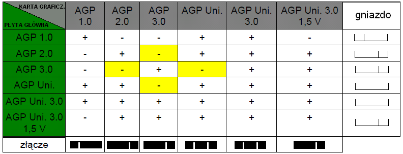 Kompatybilność kart AGP z płytami głównymi.